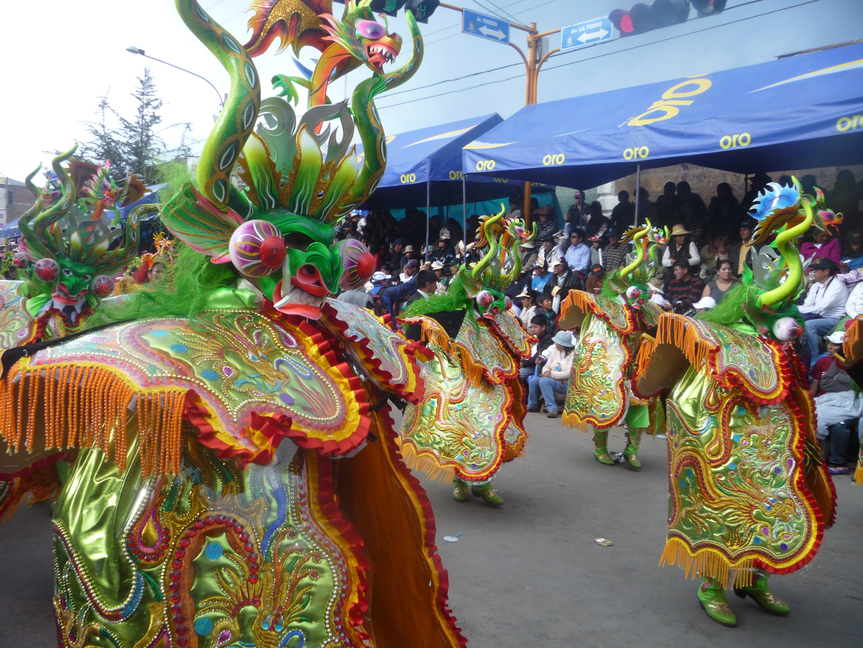 Candelaria 2013